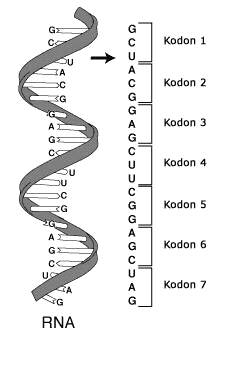 Modifierad kopia av en-bild